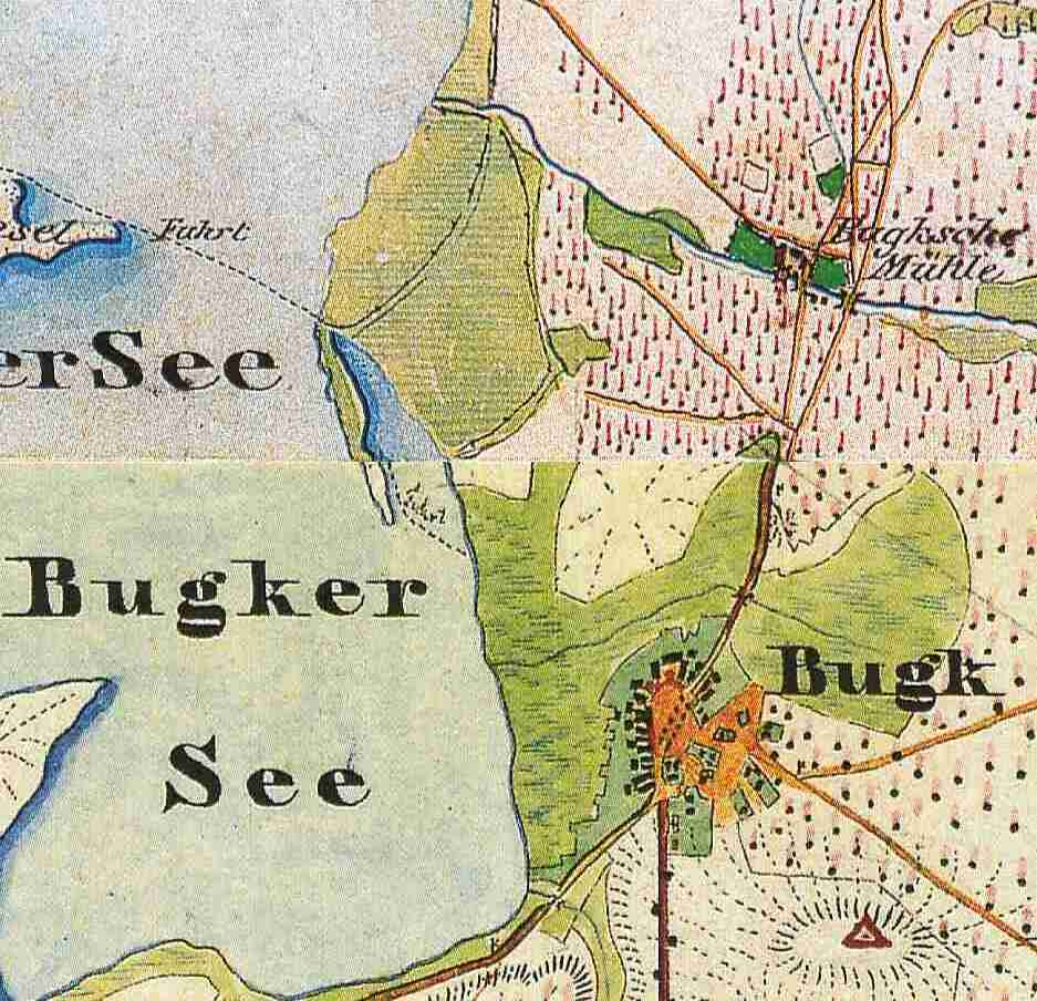 Bugk, Ortsteil der Stadt Storkow (Mark), Lkr. Oder-Spree, Brandenburg, Deutschland, Ausschnitt aus den Urmesstischblätter 3749 Stork von 1844 und 3849 Alt-Schadow von 1846 (kombiniert)